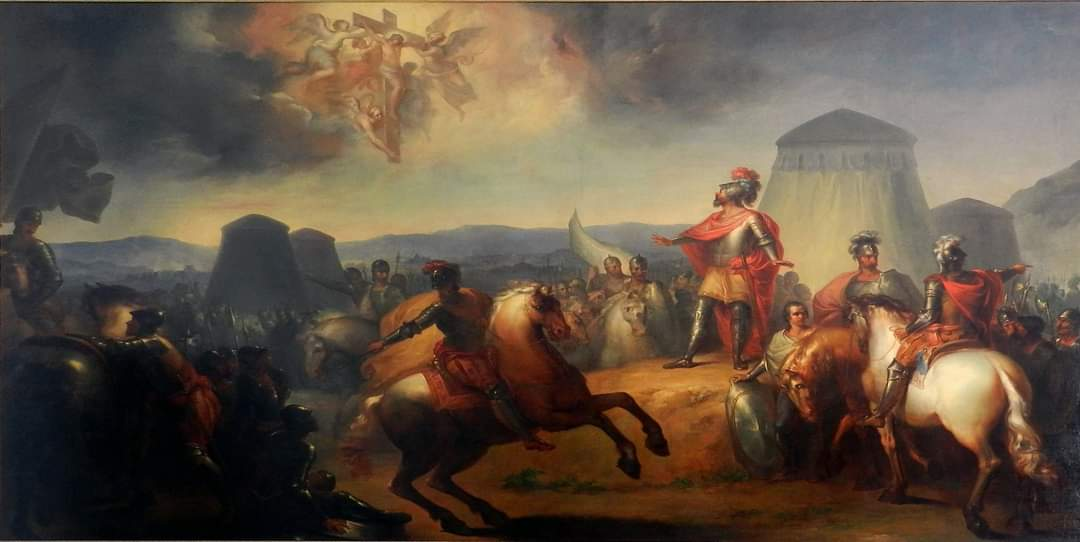 Battle of Ourique (1139)